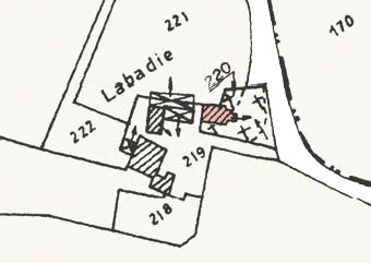 Dessin d'un extrait de plan cadastral